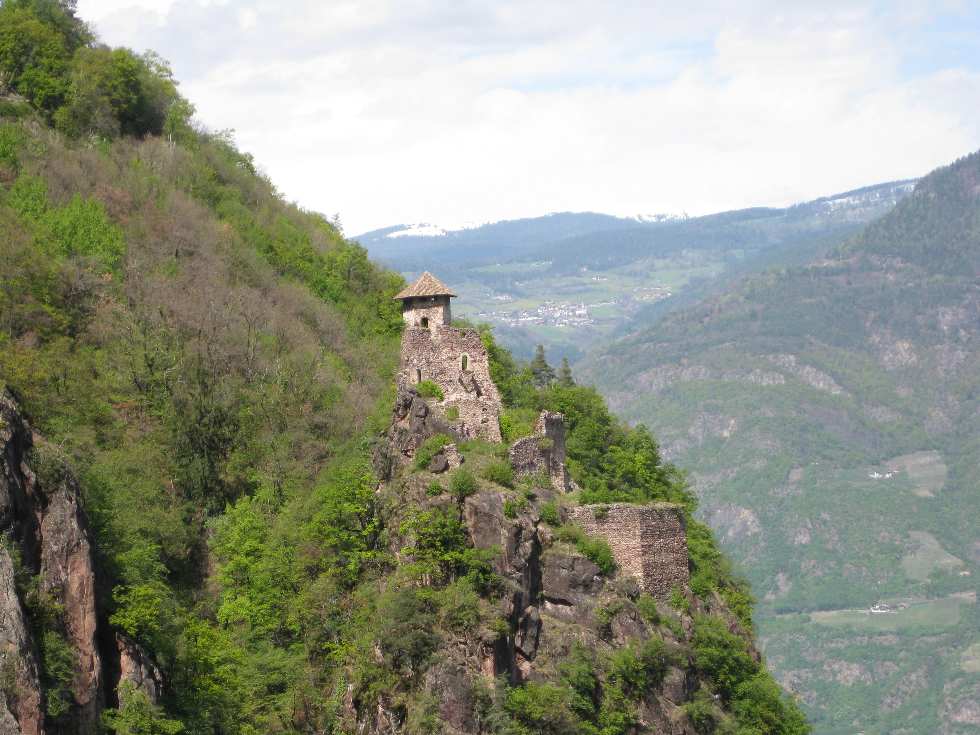 Festenstein ober Andrian